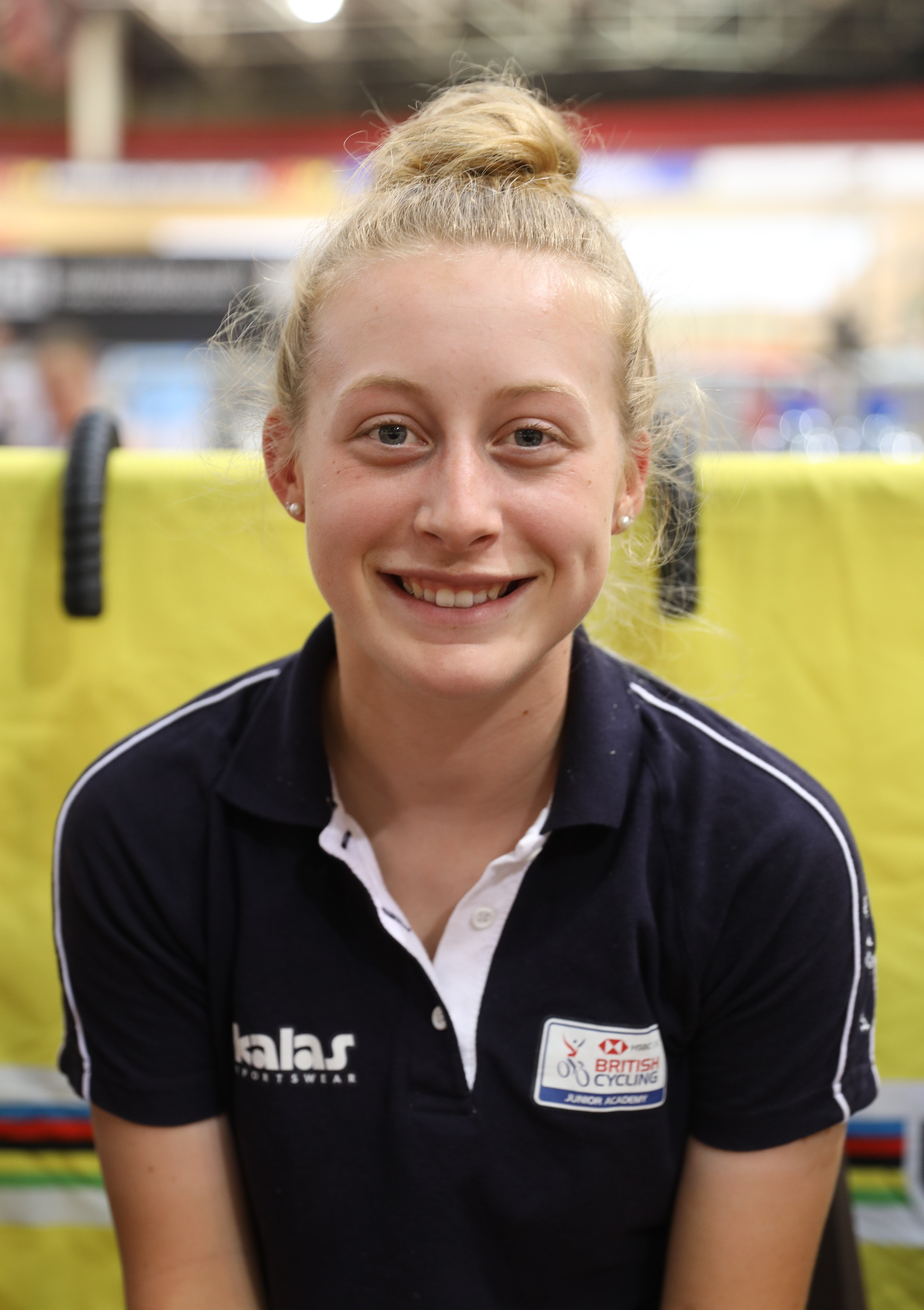 Elynor Bäckstedt, britische Radsportlerin